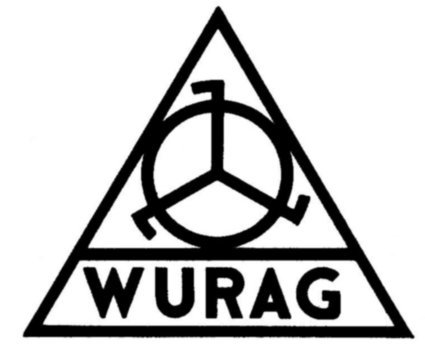 Markenzeichen der WURAG Eisen- und Stahlwerke, Hohenlimburg. Aktenzeichen DE641355 beim DPMA. Marke wurde am 26.06.2003 gelöscht.